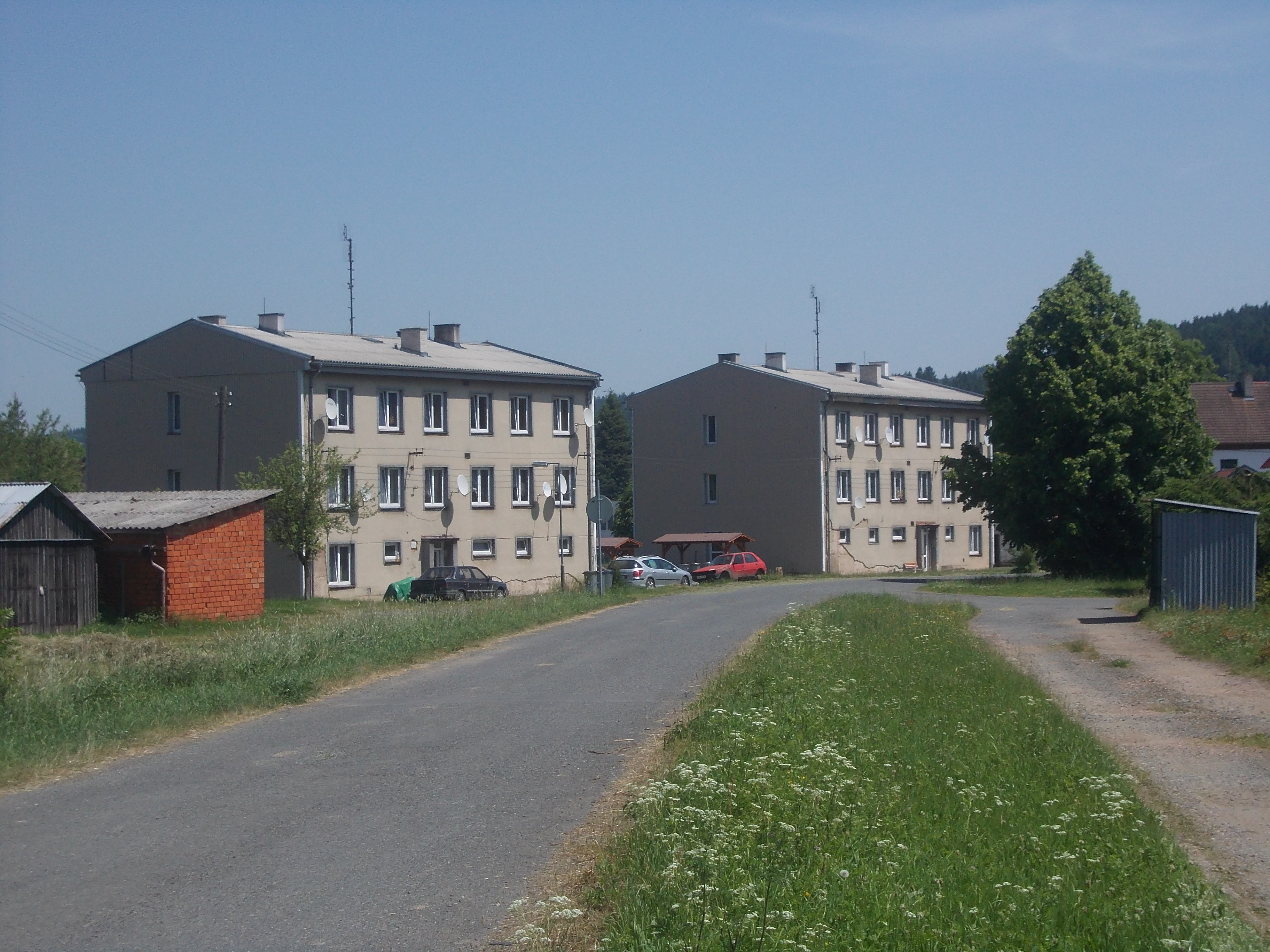 Obec Rybník v okrese Domažlice.